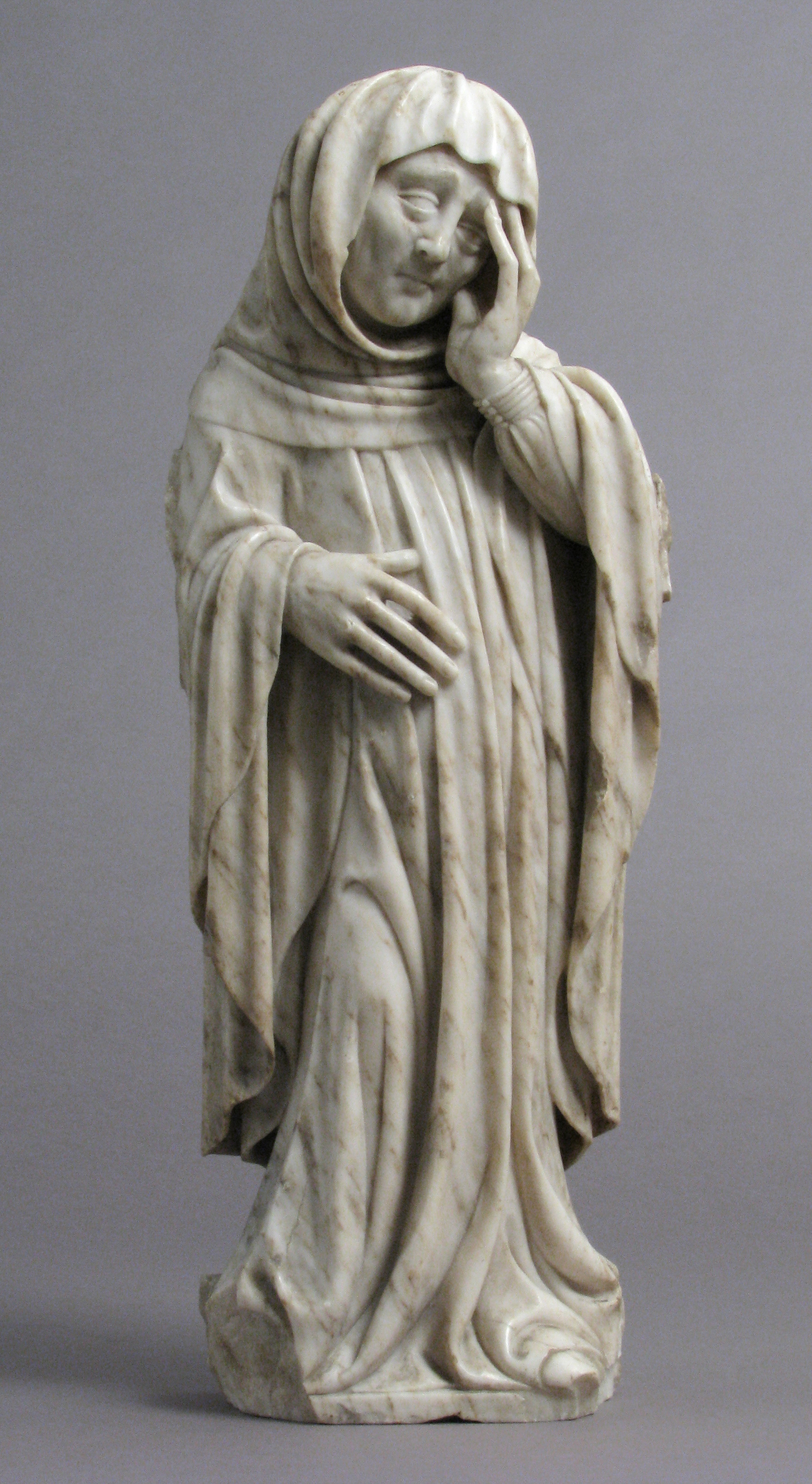 Catalan; Statuette; Sculpture-Stone